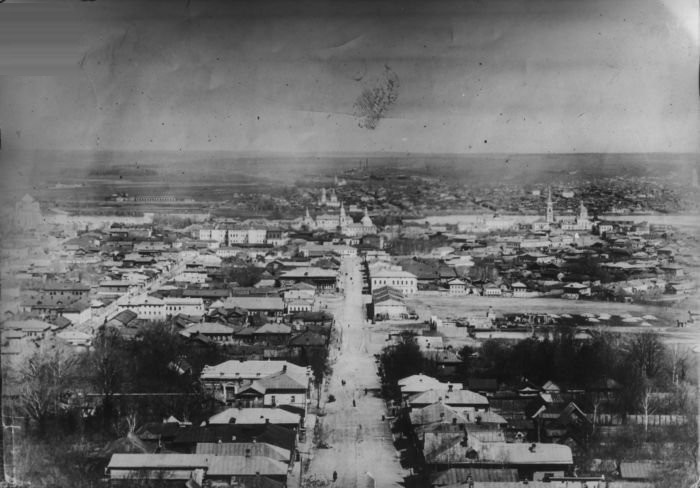 Панорама со Всехсвятской колокольни. Вид на ул. Пирогова (справа видна Хлебная площадь)